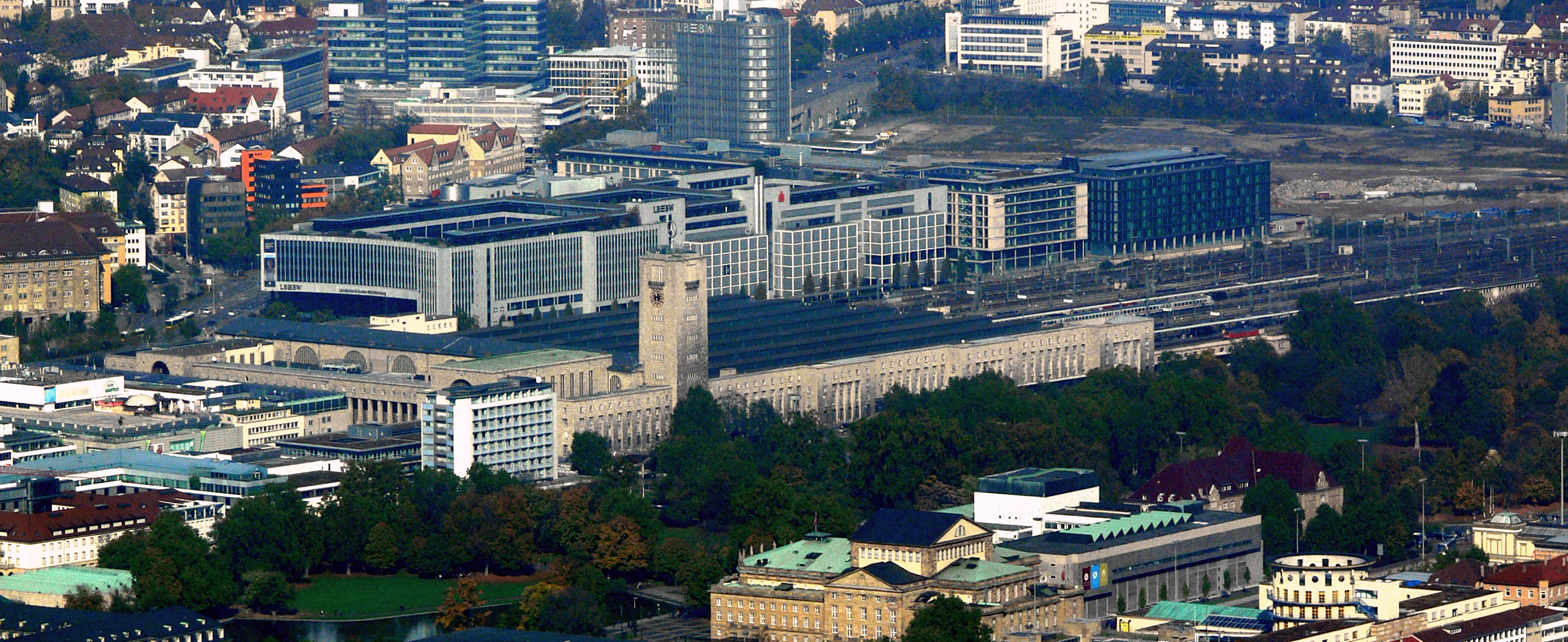 Hauptbahnhof Stuttgart, gesehen vom Fernsehturm